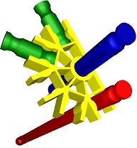 Présentation des connexions de base du jeux de construction K'nex. Image réalisée par ordinateur ( par mon programme personnel.